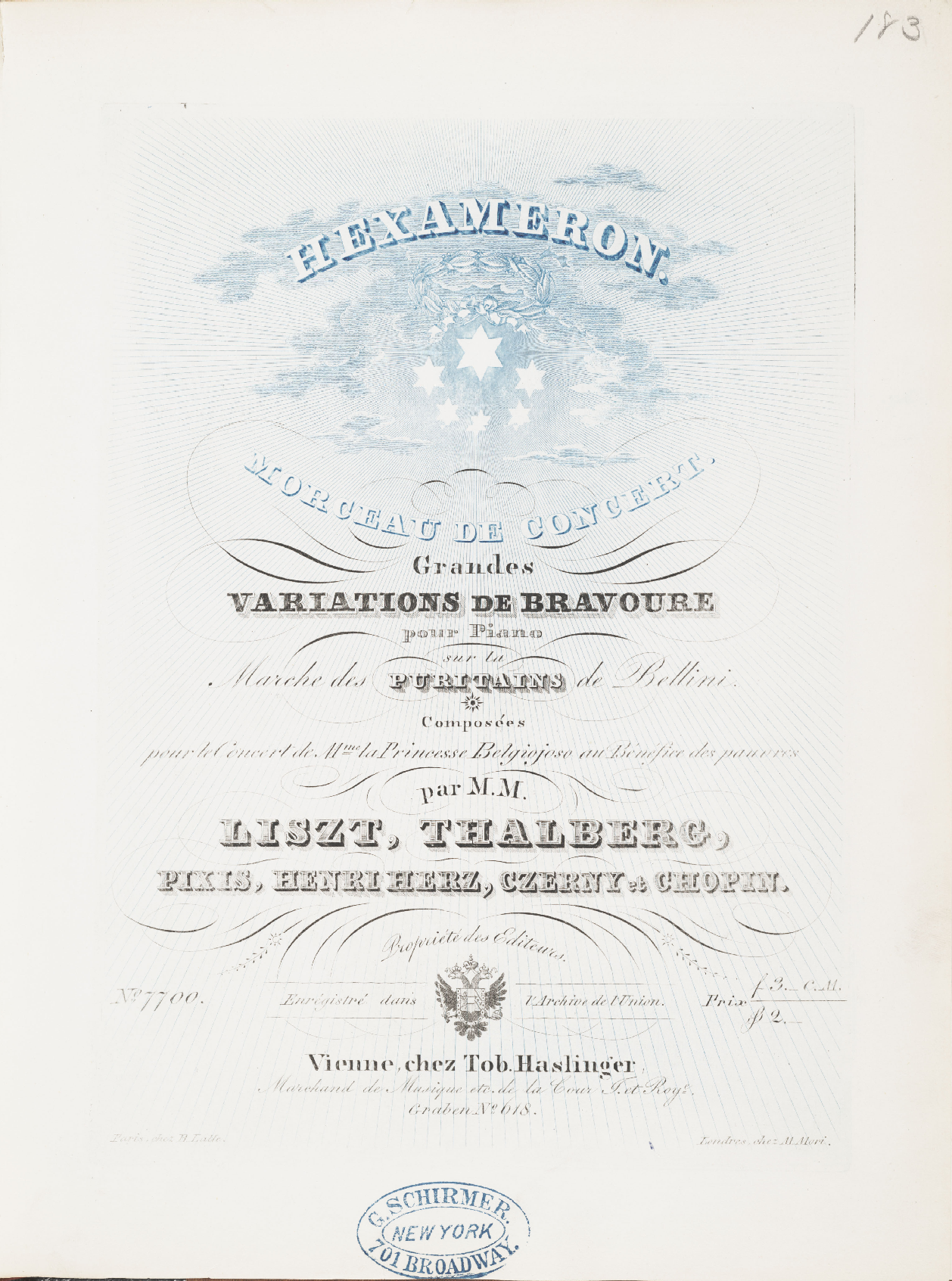 Première de couverture d'une édition viennoise datant de 1839 de l'« Hexaméron » pour piano, S. 392, de Franz Liszt